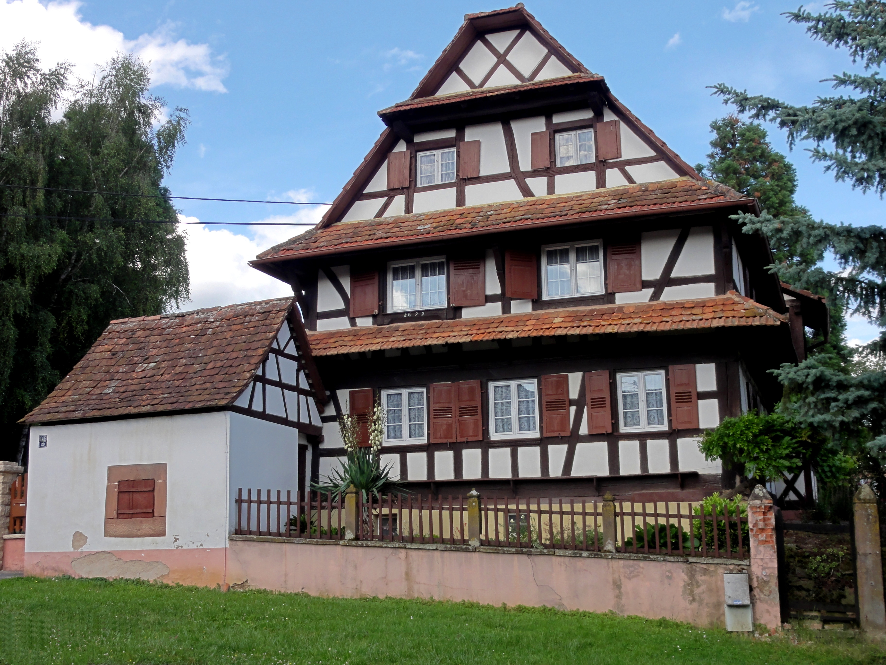 Alsace, Bas-Rhin, Alteckendorf, Ferme (XVIIe-XVIIIe), 20 rue de Ringendorf. .